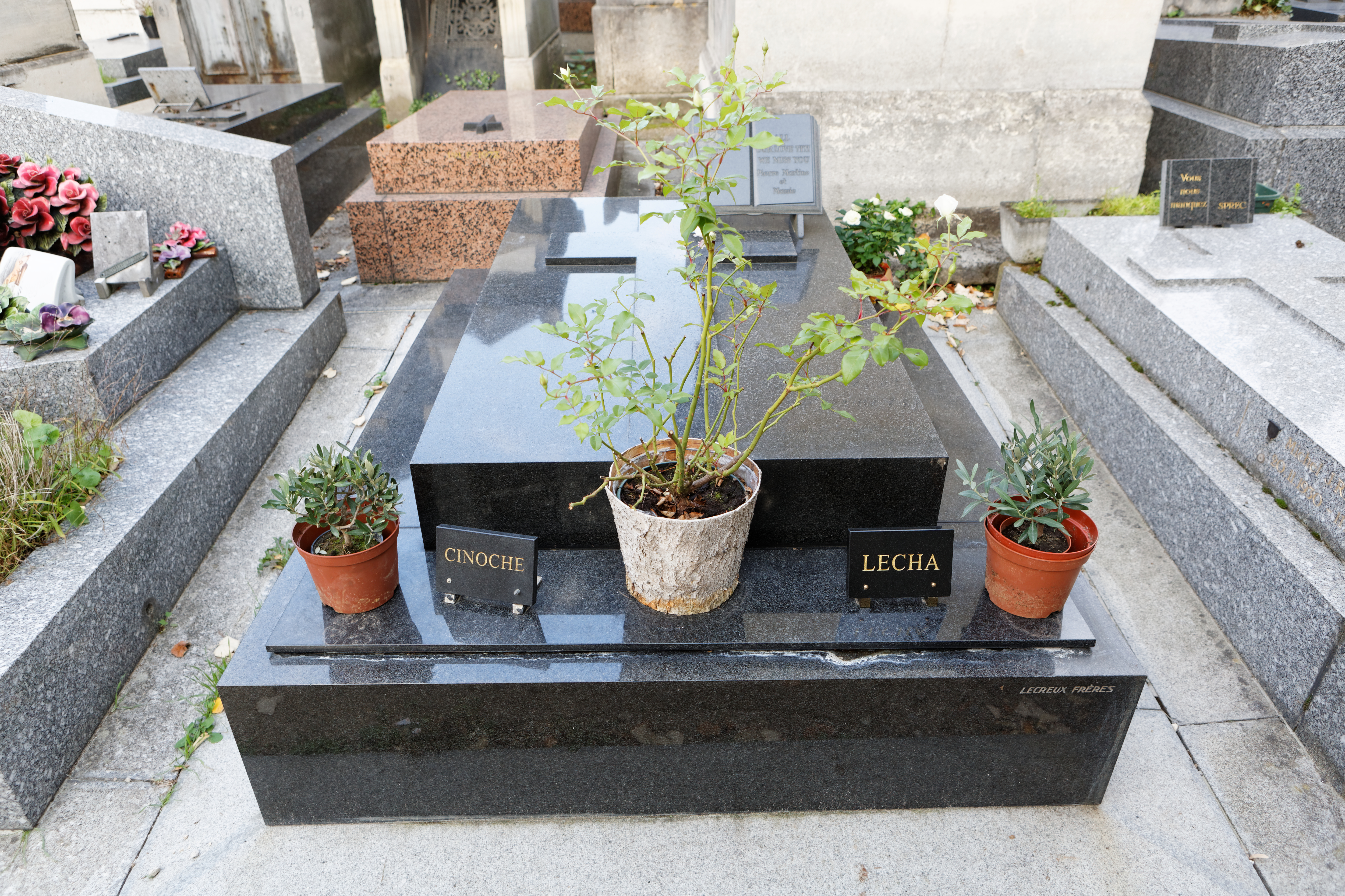 Sépulture de Patachou (1918-2015), chanteuse et actrice ; Arthur Lesser (1912-1979), mari de Patachou et producteur américain.